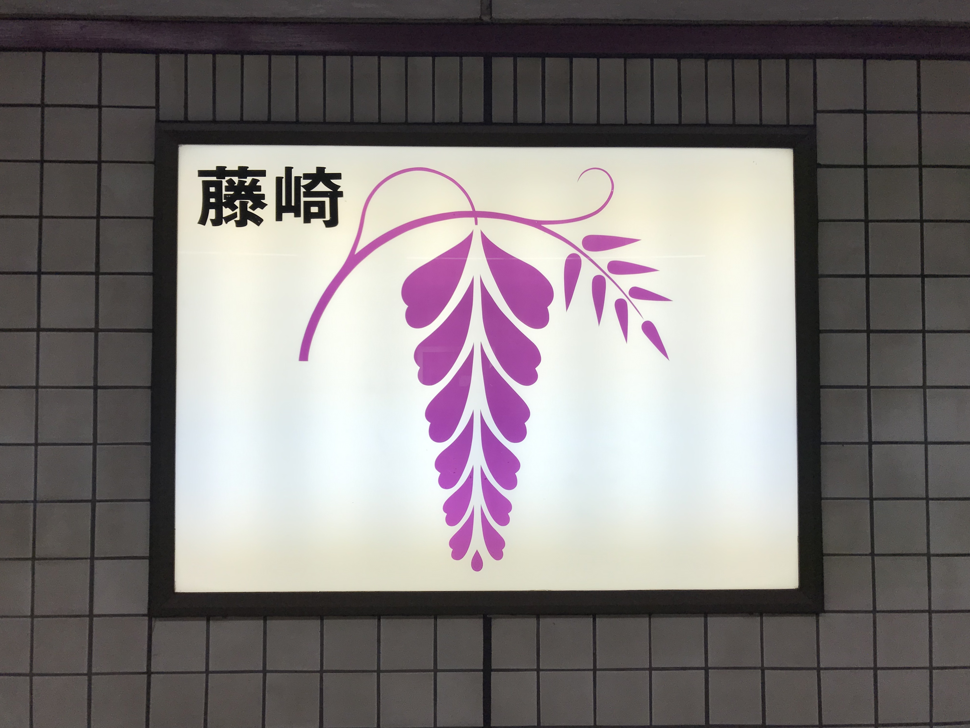 藤崎駅(福岡市営地下鉄)の駅名標。イラストは「藤崎」にちなんでフジ